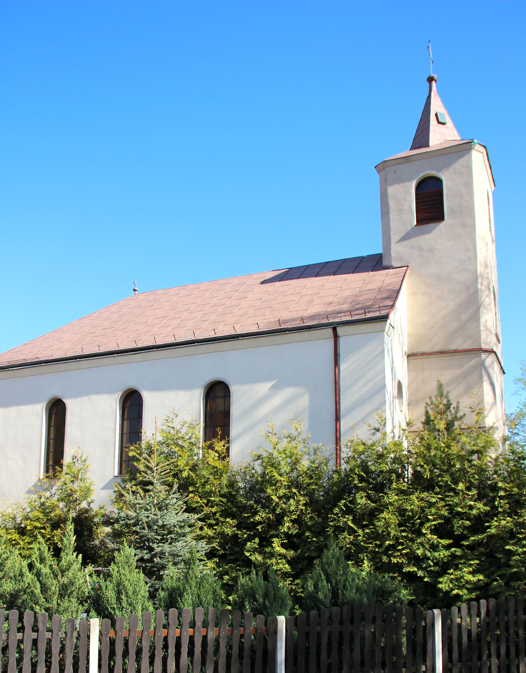 Mokre – rzymskokatolicki kościół filialny pw. św. Maksymiliana Kolbe.